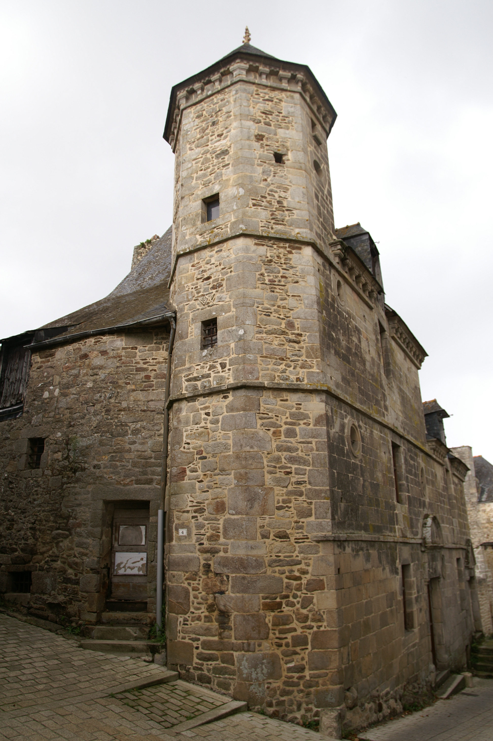 Hôtel Sevoy à Jugon-les-Lacs.